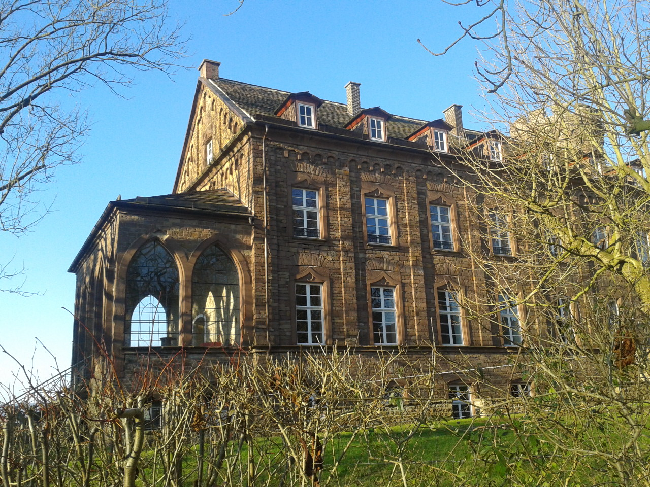 Burg Herstelle, Beverungen, mit Wintergarten, links im Bild